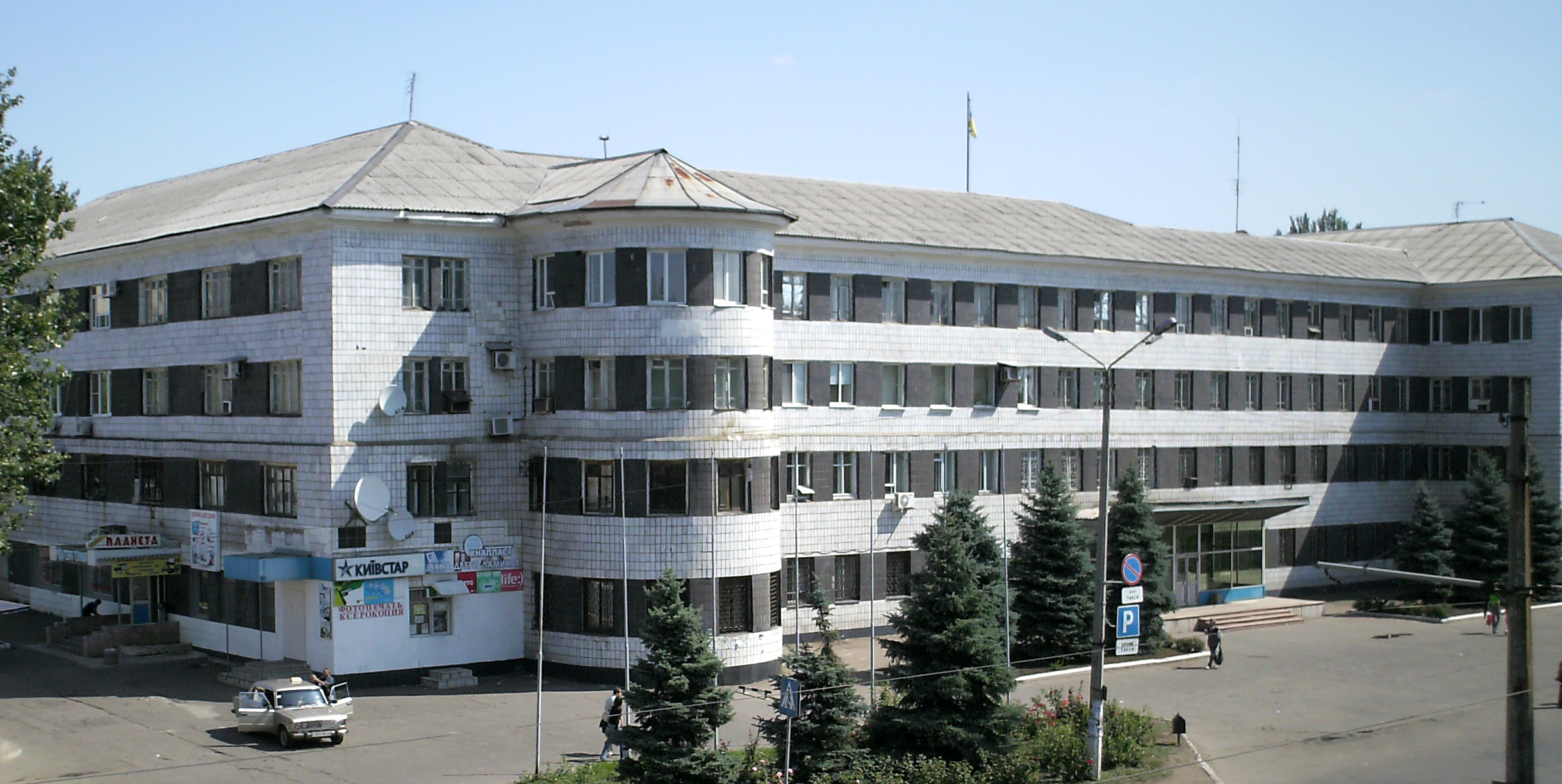 Донецкая область